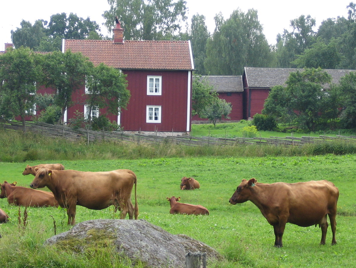 Stensjö by, Oskarshamns kommun